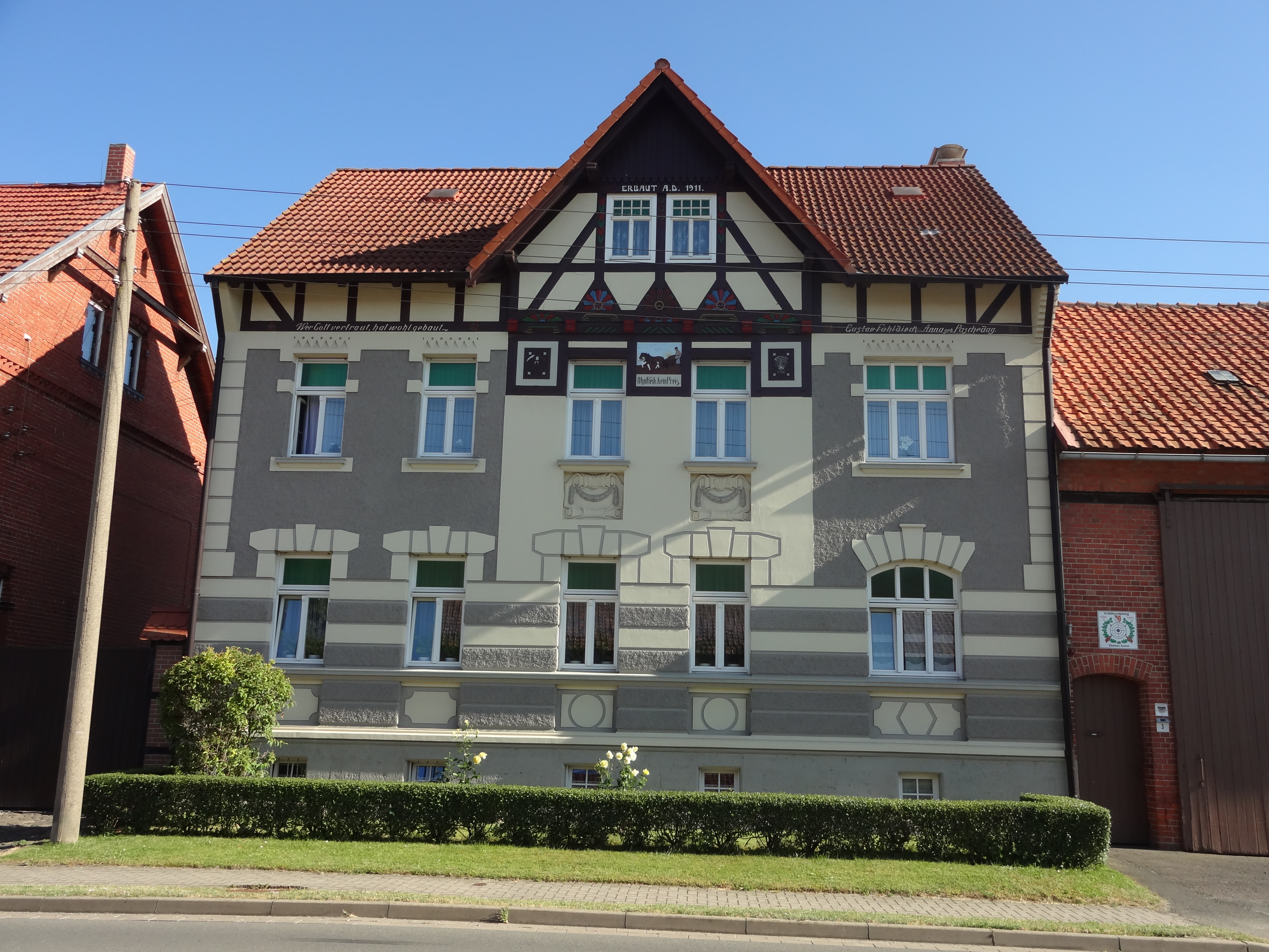 denkmalgeschütztes Bauernhaus in der Otto-Bethmann-Straße 3 in Harsleben